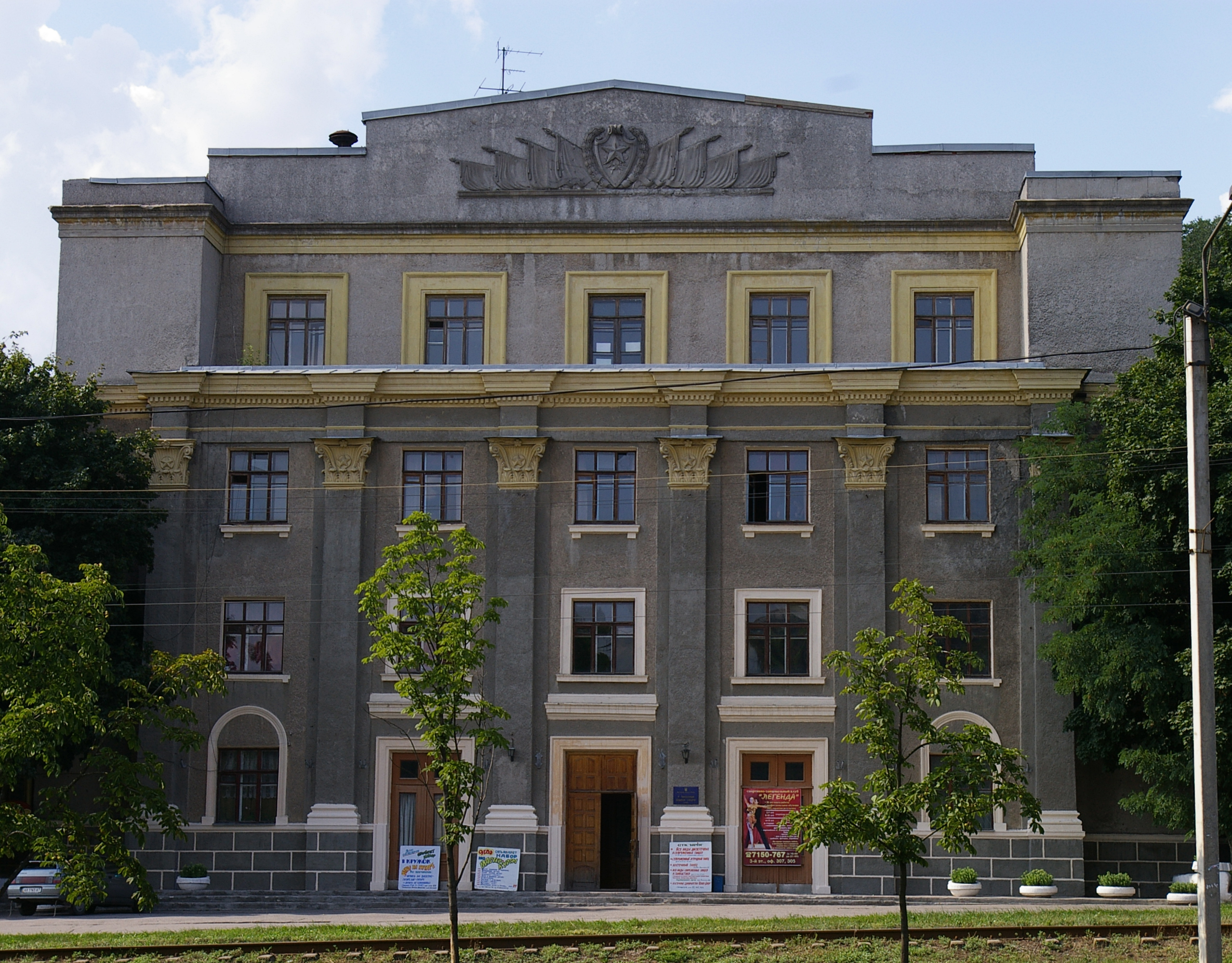 Харьков, на Полтавской дороге